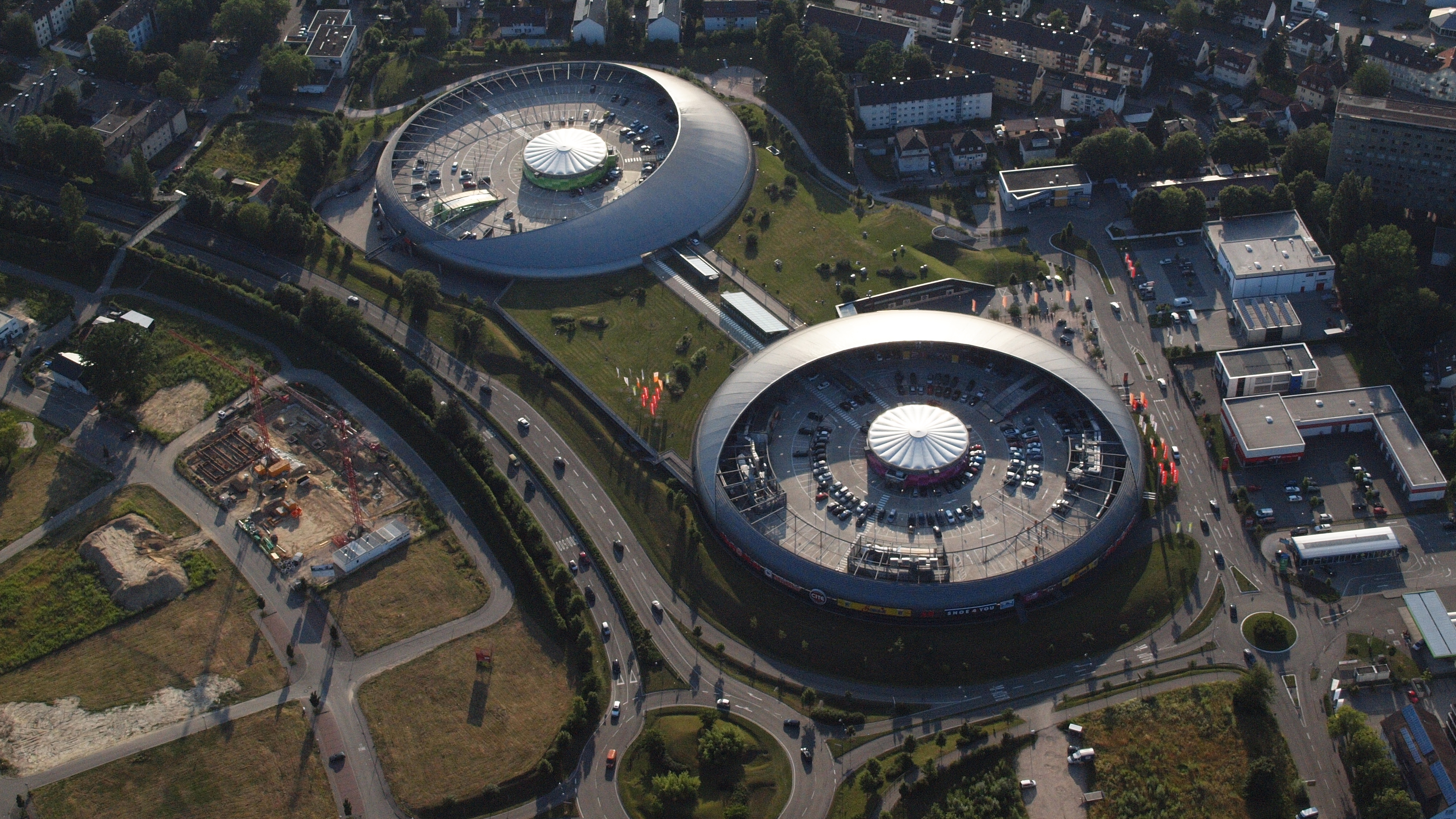 Baden-Baden, Gewerbepark Cite